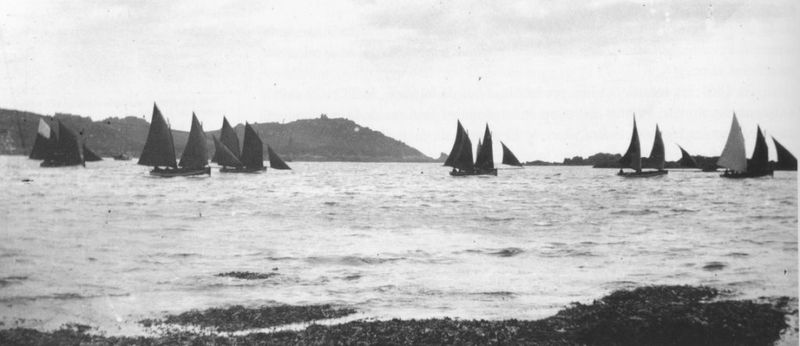 Régate à Trébeurden en 1900